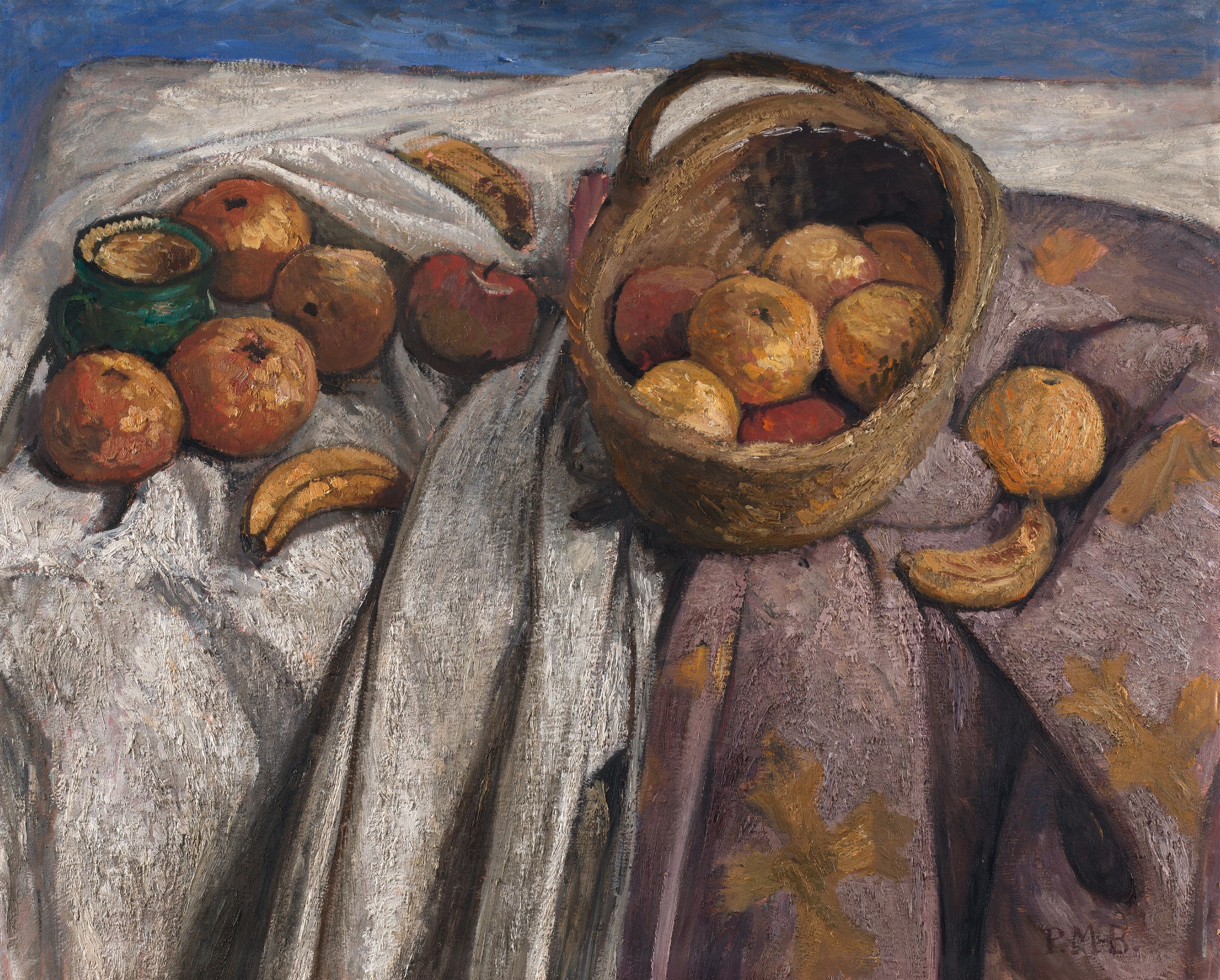 Paula Modersohn-Becker: Stillleben mit Äpfeln und Bananen, 1905, Kunsthalle Bremen